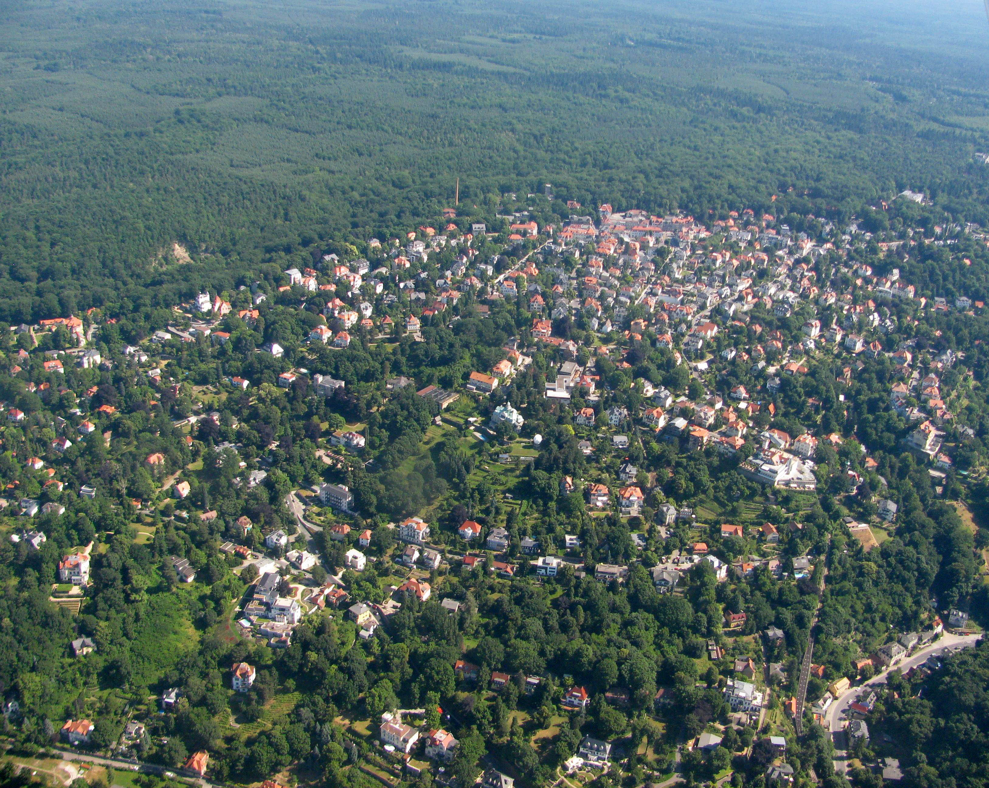 Luftbild: Blick auf Oberloschwitz und Weißer Hirsch - Denkmalschutzgebiet Weißer Hirsch/Oberloschwitz.